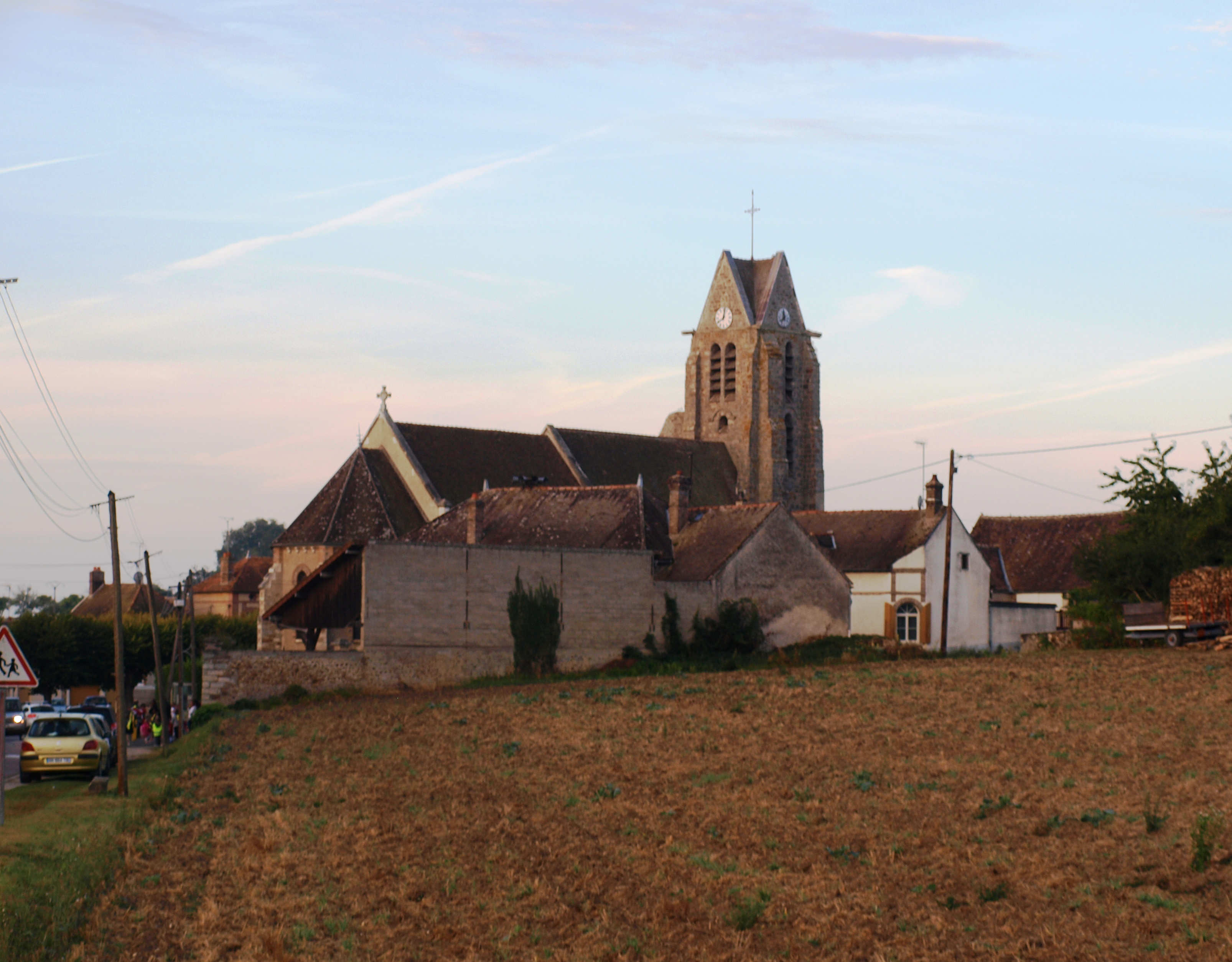 Brannay (Yonne, France), vue du centre depuis la route de Pont-sur-Yonne.